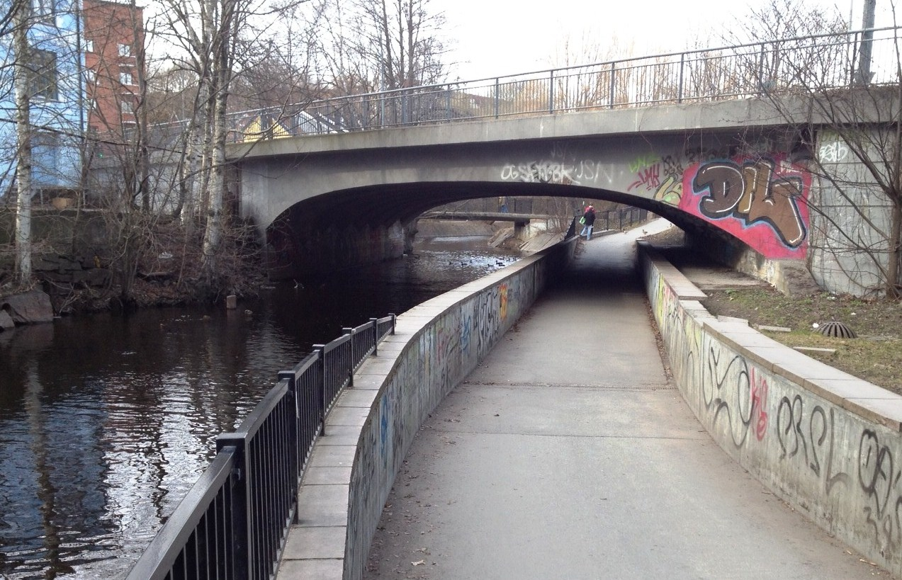 Vøyenbrua over Akerselva, Oslo, Norway